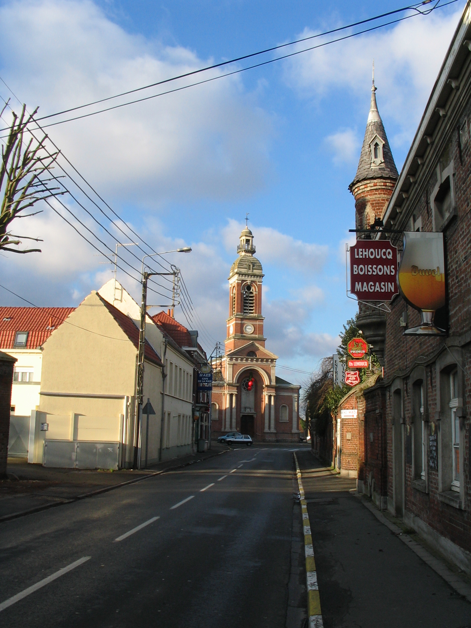 Photo de la Rue de la Poste à Gondecourt. Photo tirée par Boris Baski en décembre 2004.